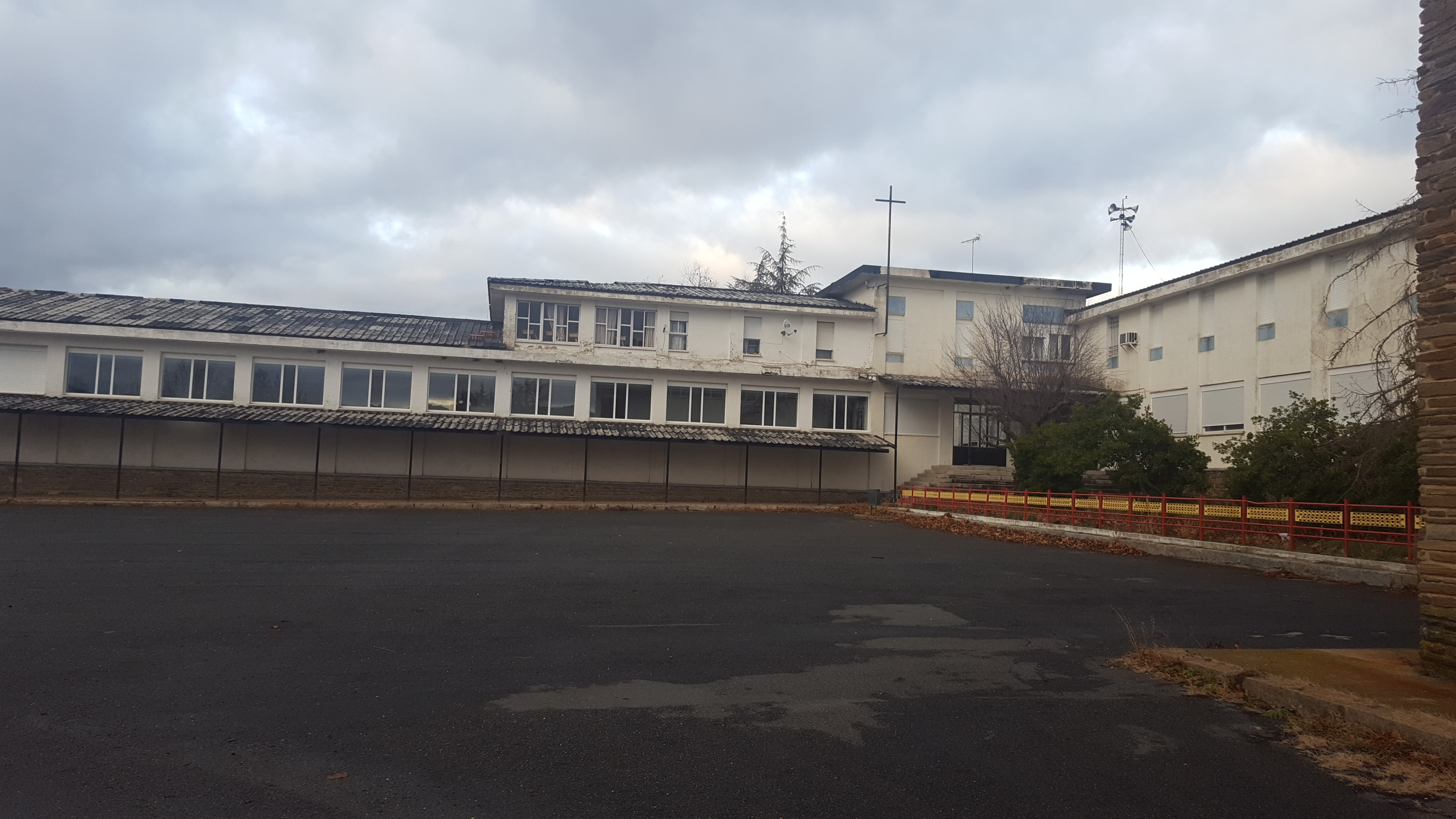 Colegio de la Inmaculada. Armenteros, Salamanca, España